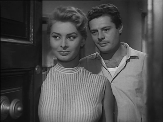 Screenshot del film Peccato che sia una canaglia (1954) di Alessandro Blasetti.